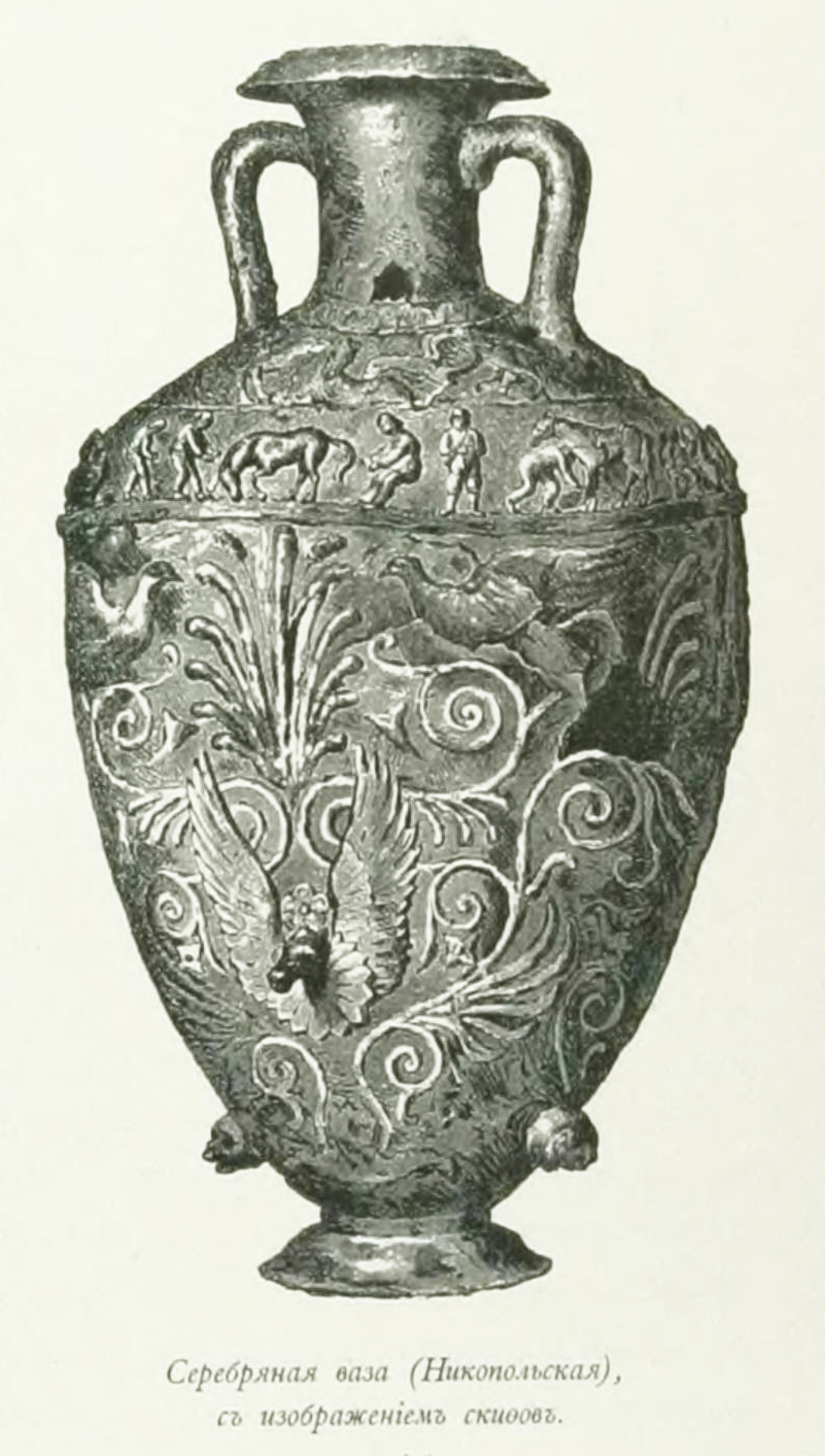 Великокняжеская, царская и императорская охота на Руси